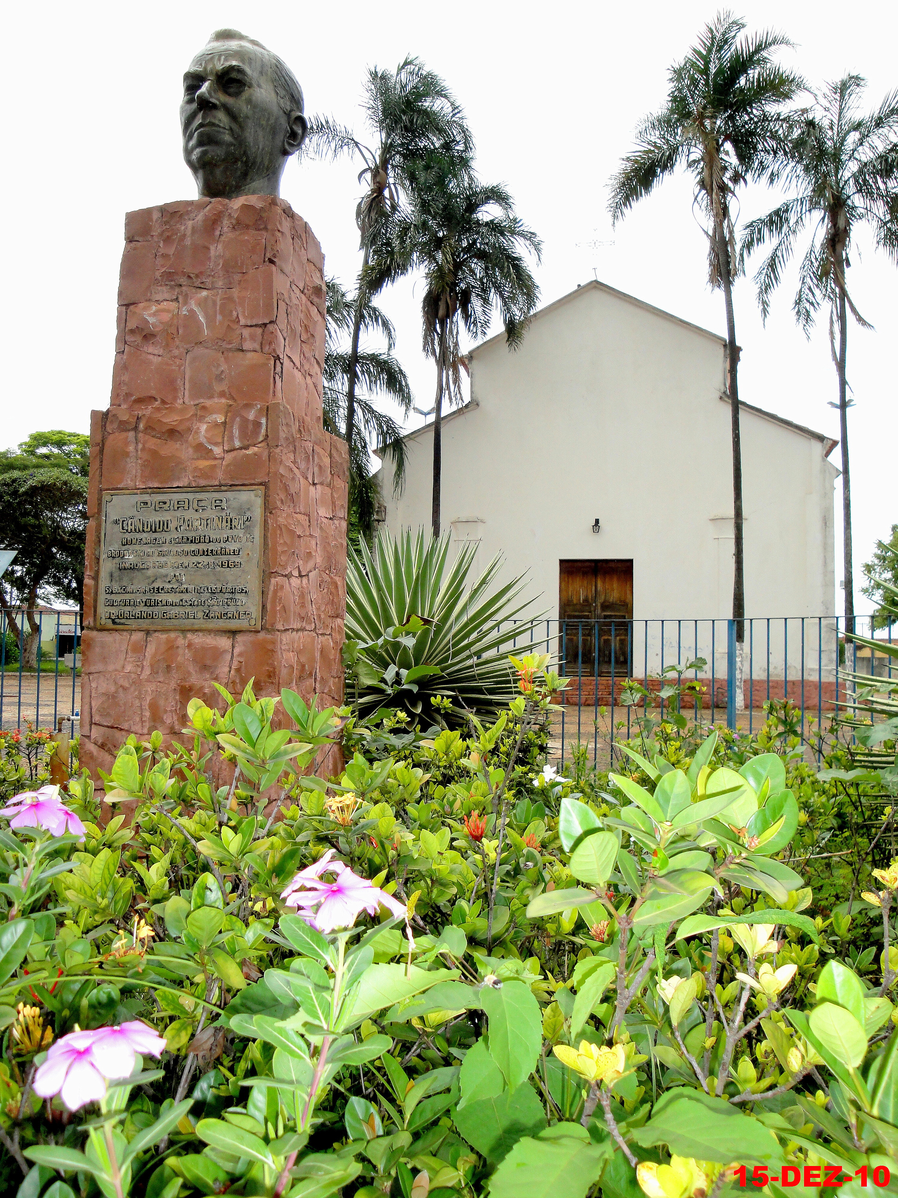 Praça Cândido Portinari, ao fundo a Igreja de Santo Antônio. Portinari pintou a imagem de Santo Antônio, em cumprimento a uma promessa para a melhora da saúde de seu filho João Candido. A pintura foi doada a igreja no Domingo de Páscoa de 1942